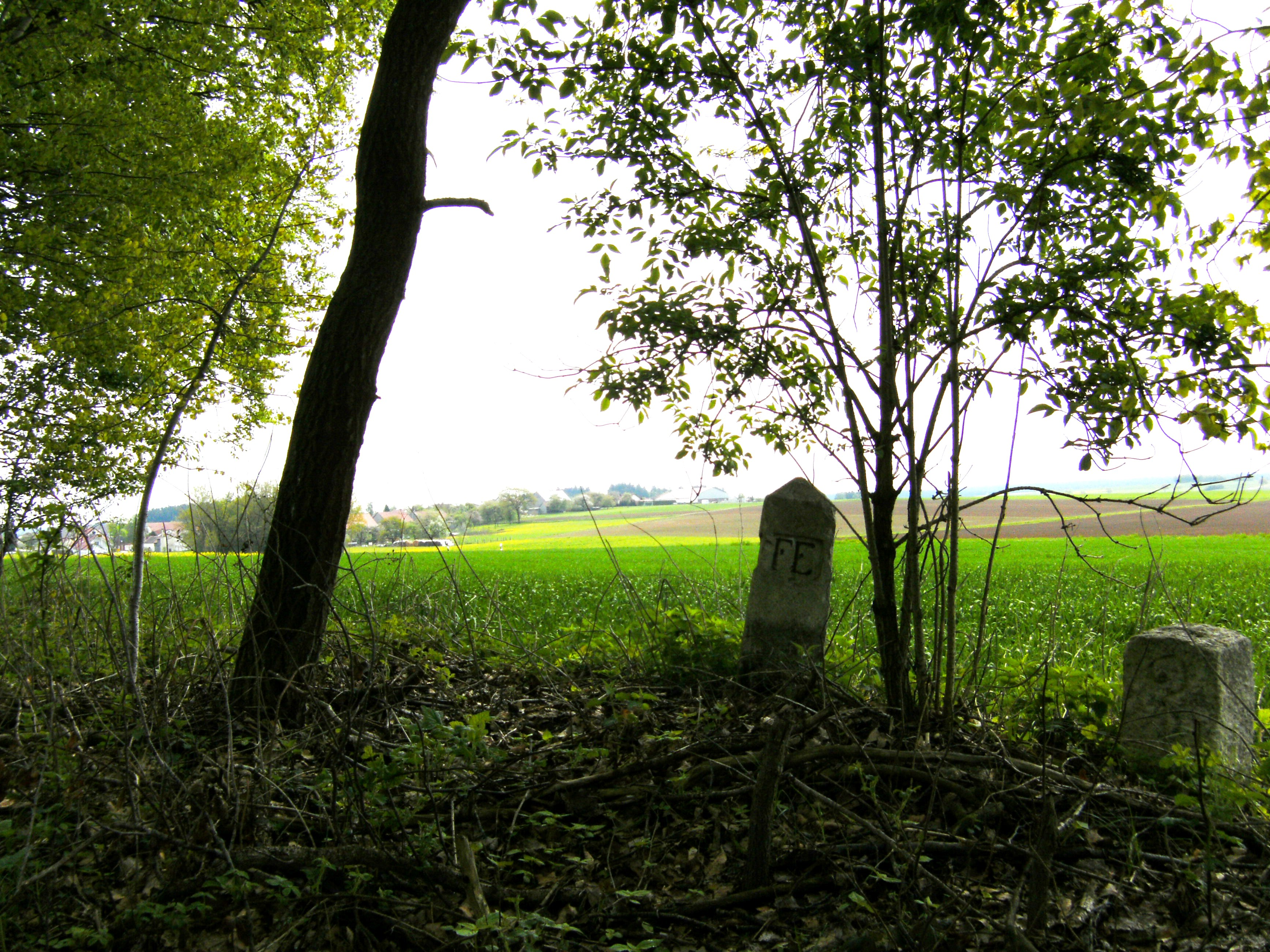 Grenzstein des ehemaligen Fürstentums Eichstätt bei Irfersdorf, Gemeindeteil der Stadt Beilngries im Landkreis Eichstätt, Bayern, Deutschland.